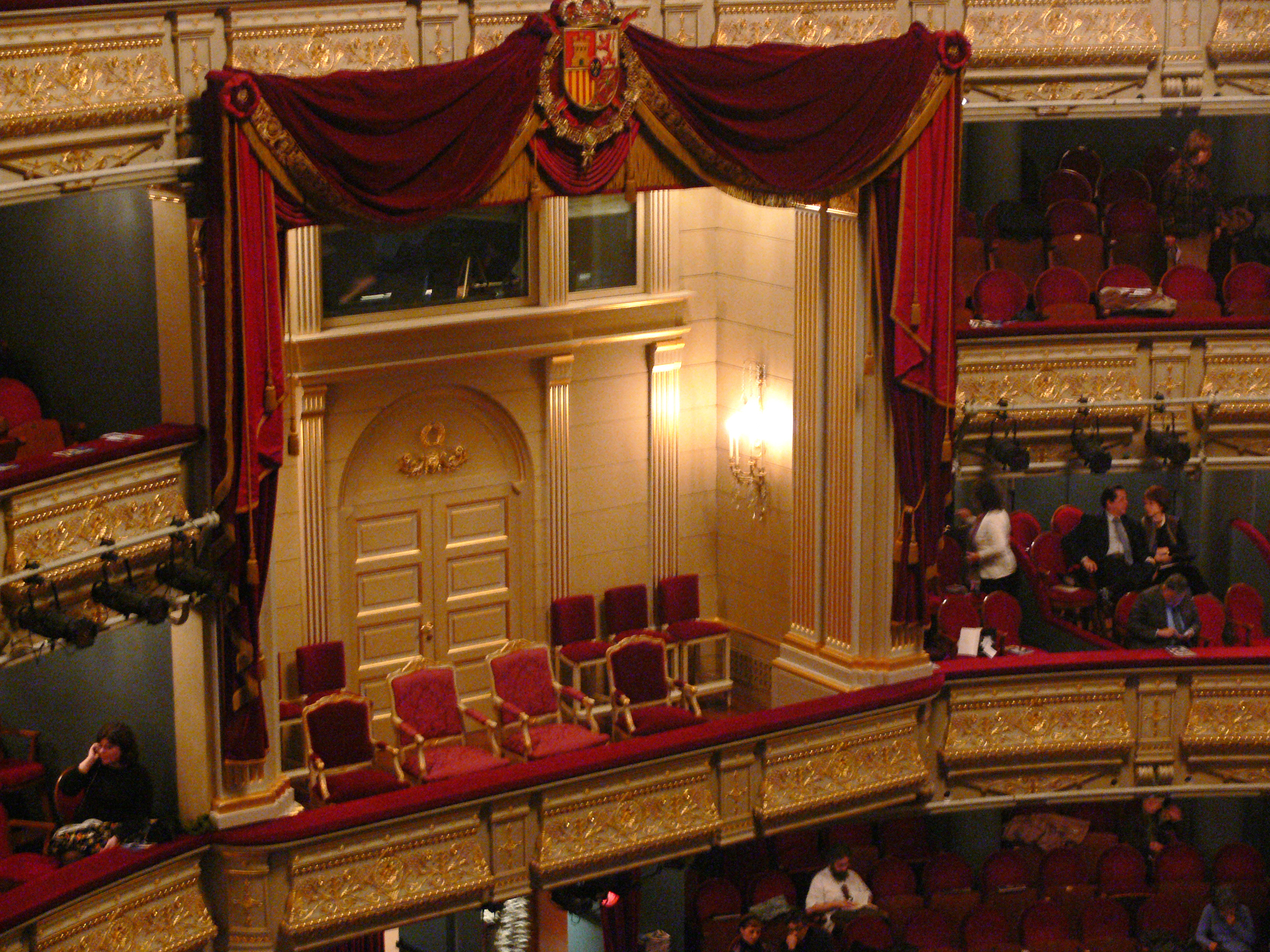 Teatro Real, Madrid: Auditorium: Royal Box